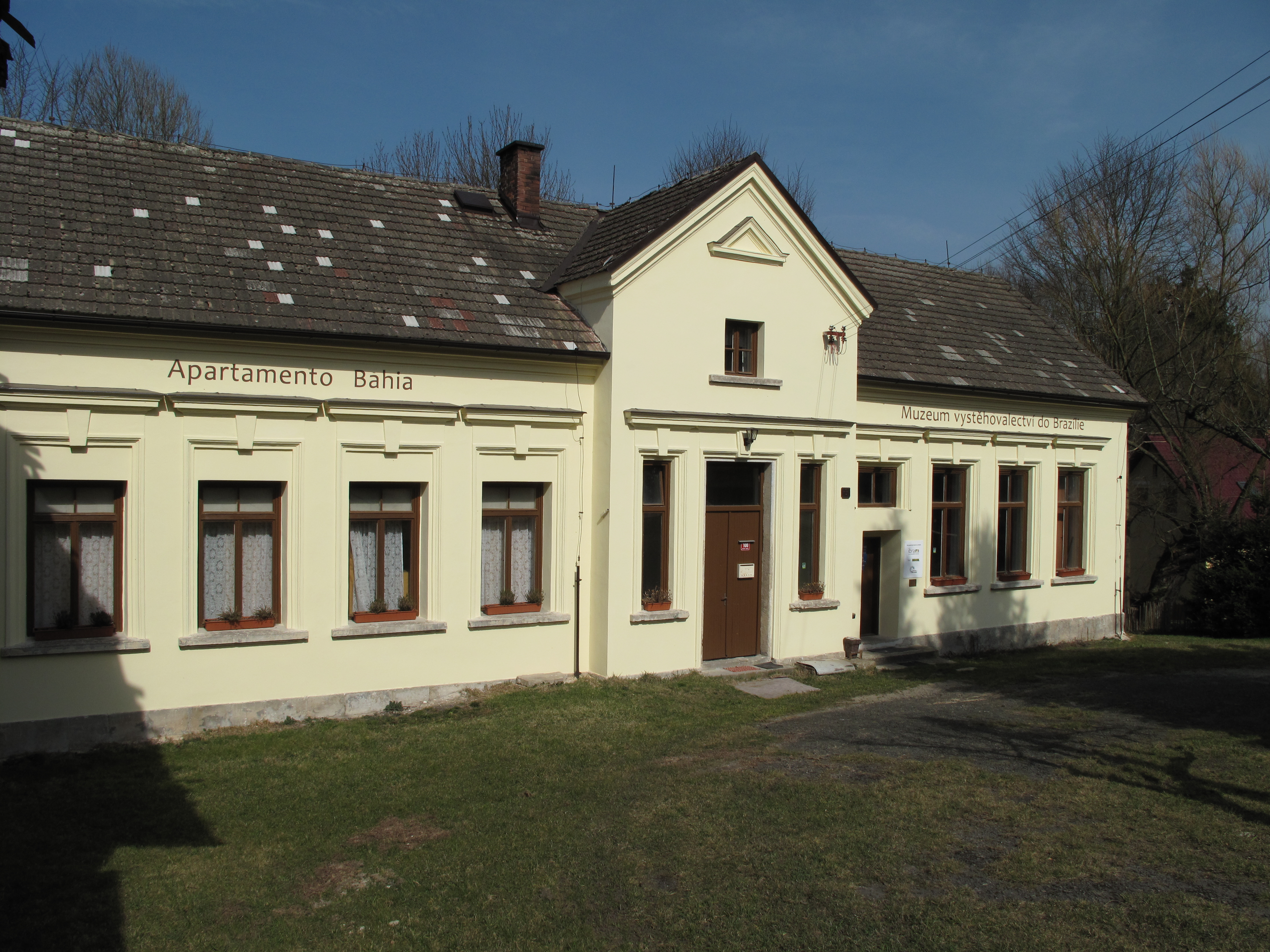 Muzeum vystěhovaletství do Brazílie v Náhlově. Okres Česká Lípa, Česká republika.